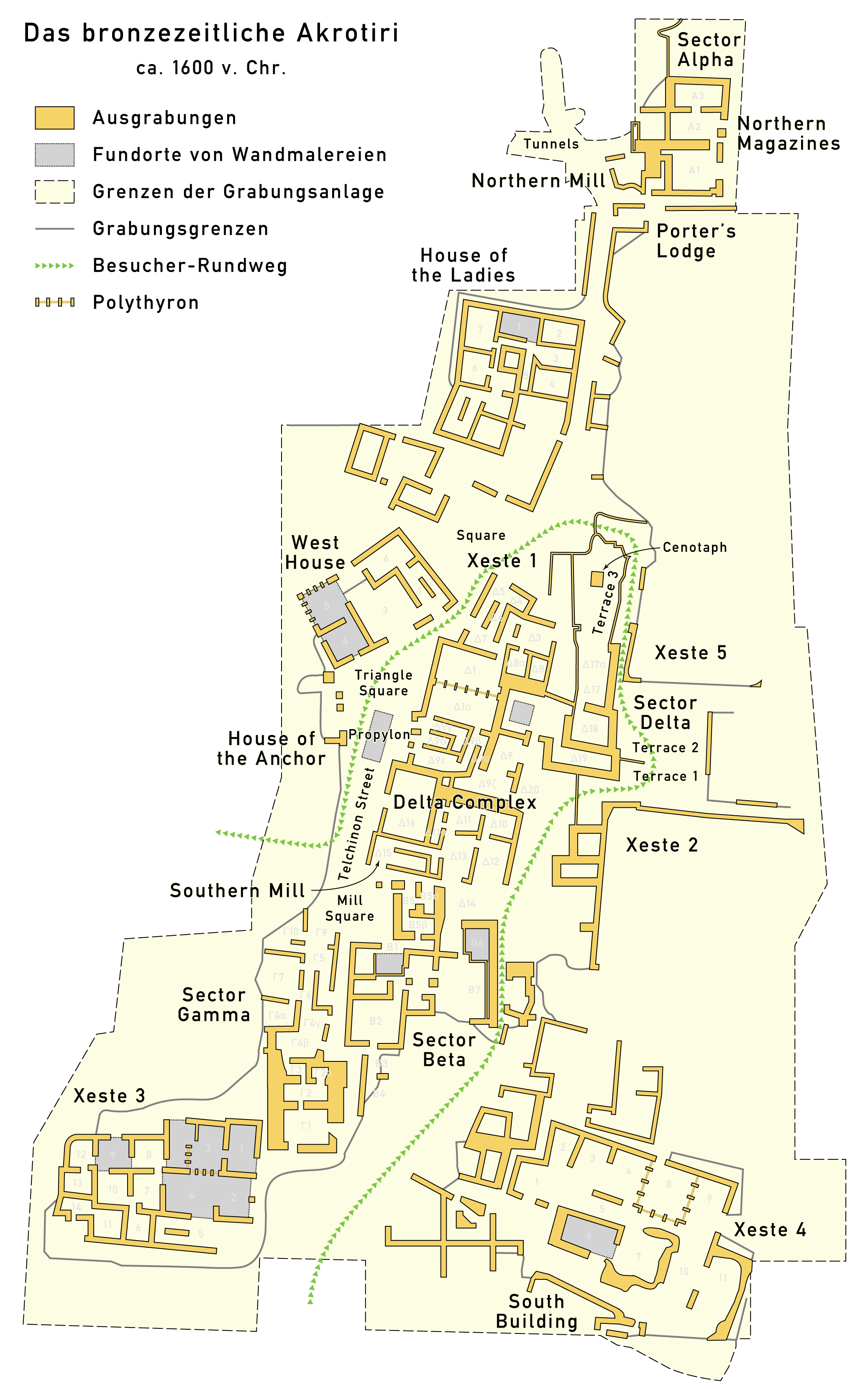 Karte des bronzezeitlichen Akrotiri (um 1600 v. Chr.)